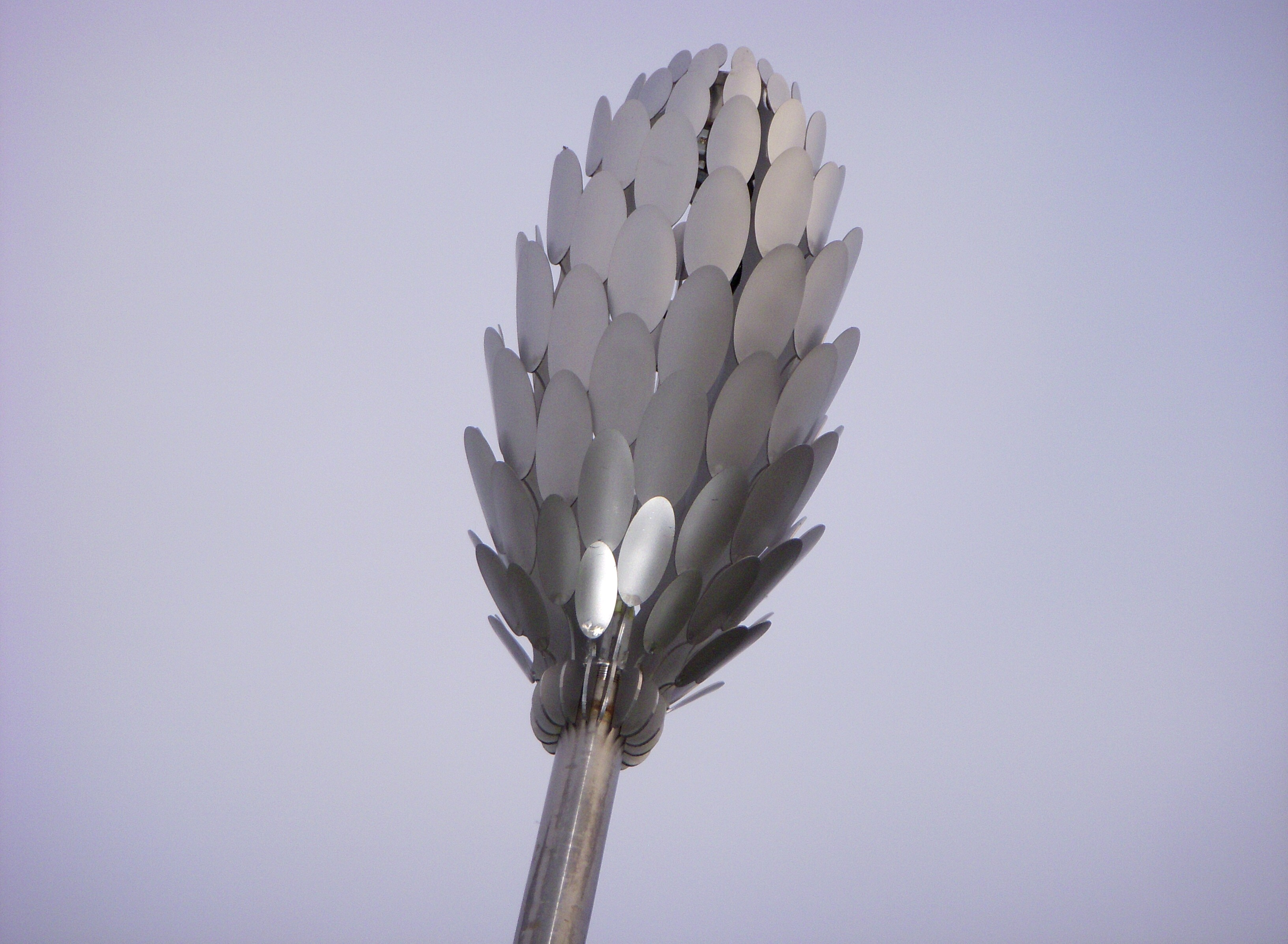 "Oas" skulptur av Thomas Nordström, Kungens kurva, Huddinge